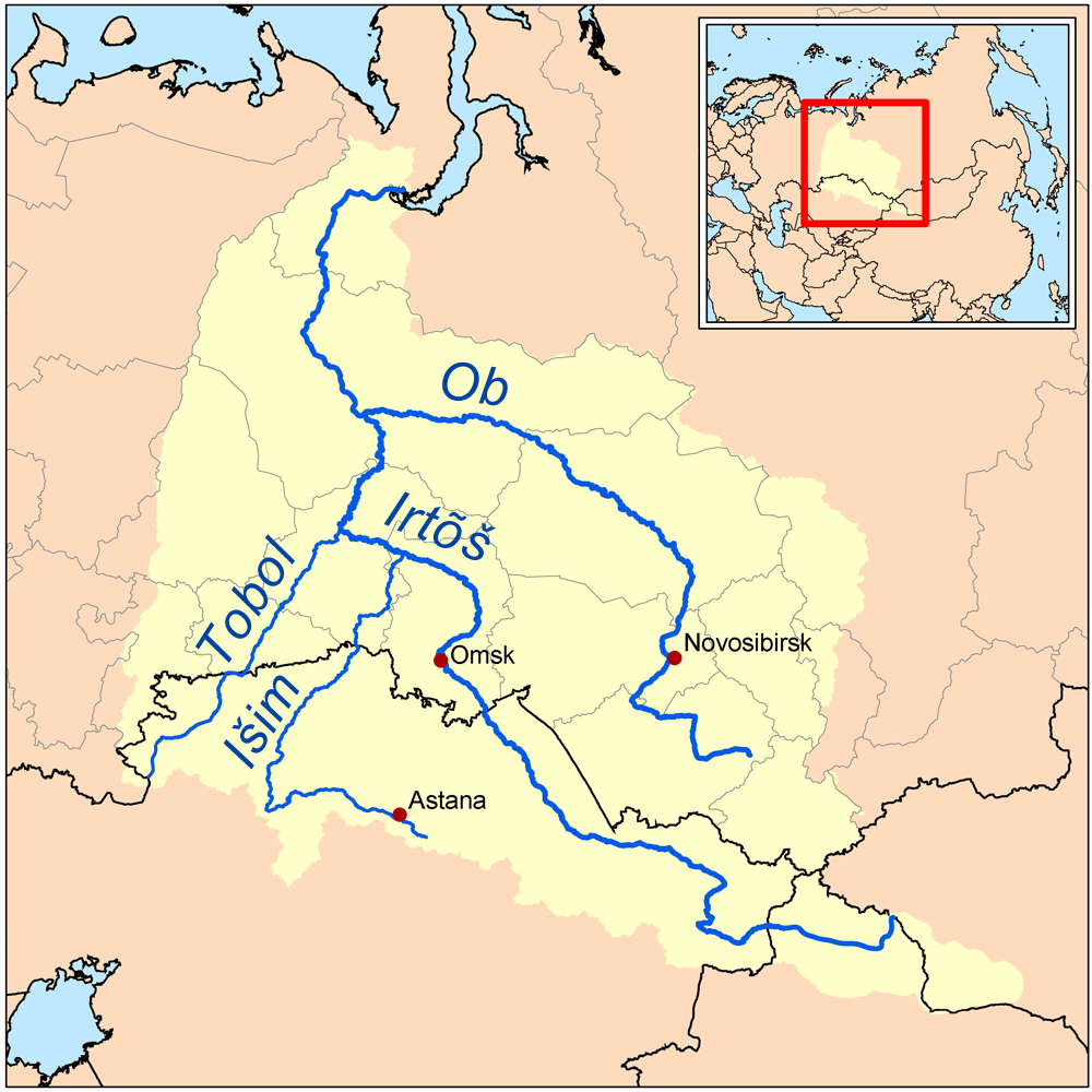 Obi jõgi